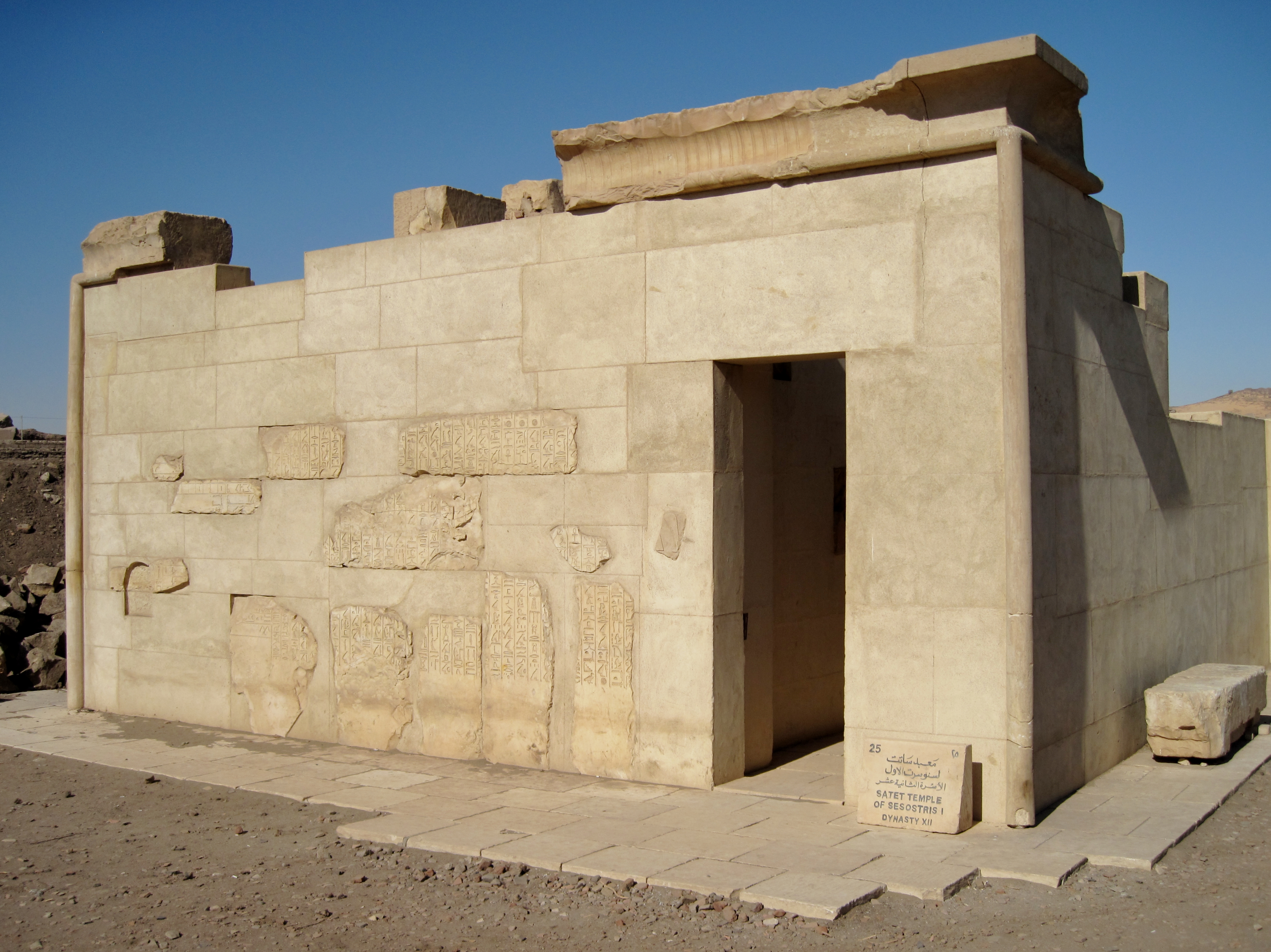 Satistempel des Sesostris I. auf der Insel Elephantine in Assuan, Ägypten